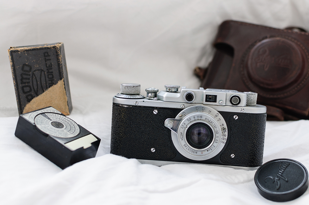 Зоркий, кожаный футляр, экспонометр.